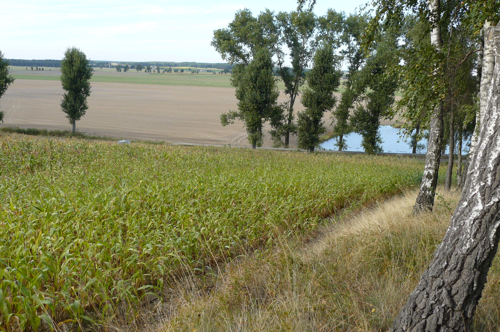 Góry Wysockie - landszafty.